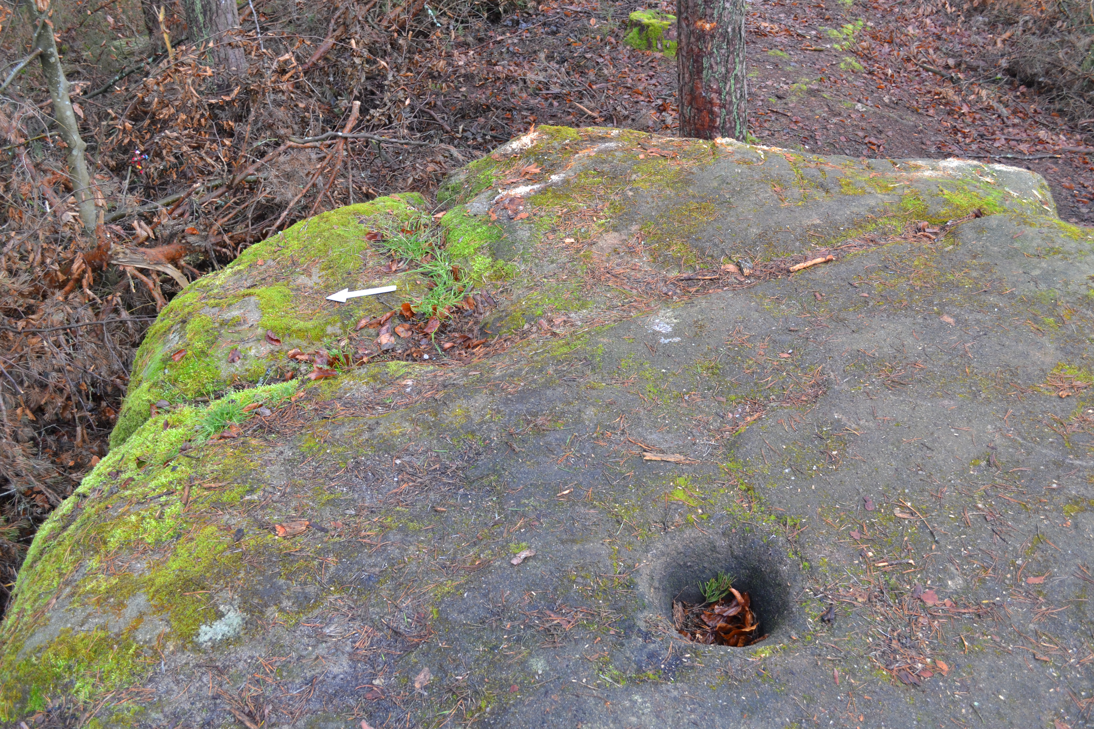 Aufnahme mit Nordpfeil